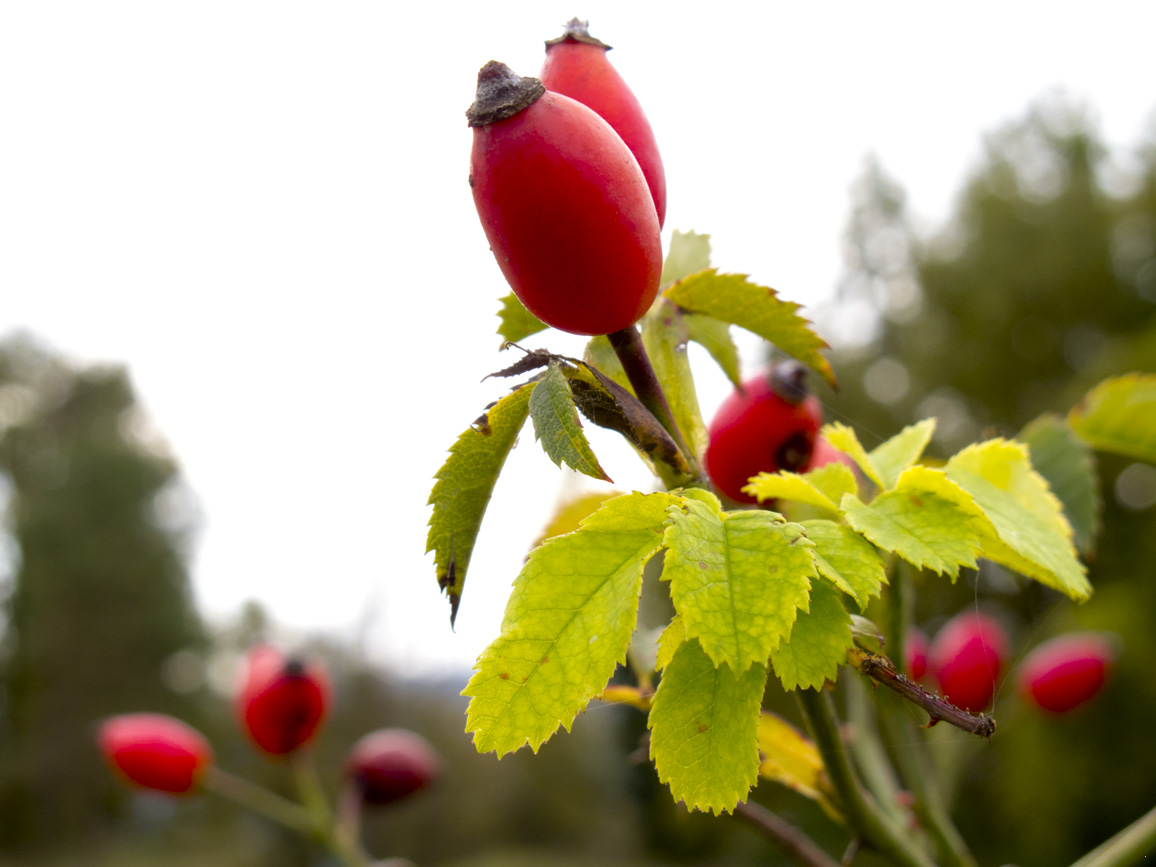 Escaramujo, Saint Boi de Lluçanès, Cataluña